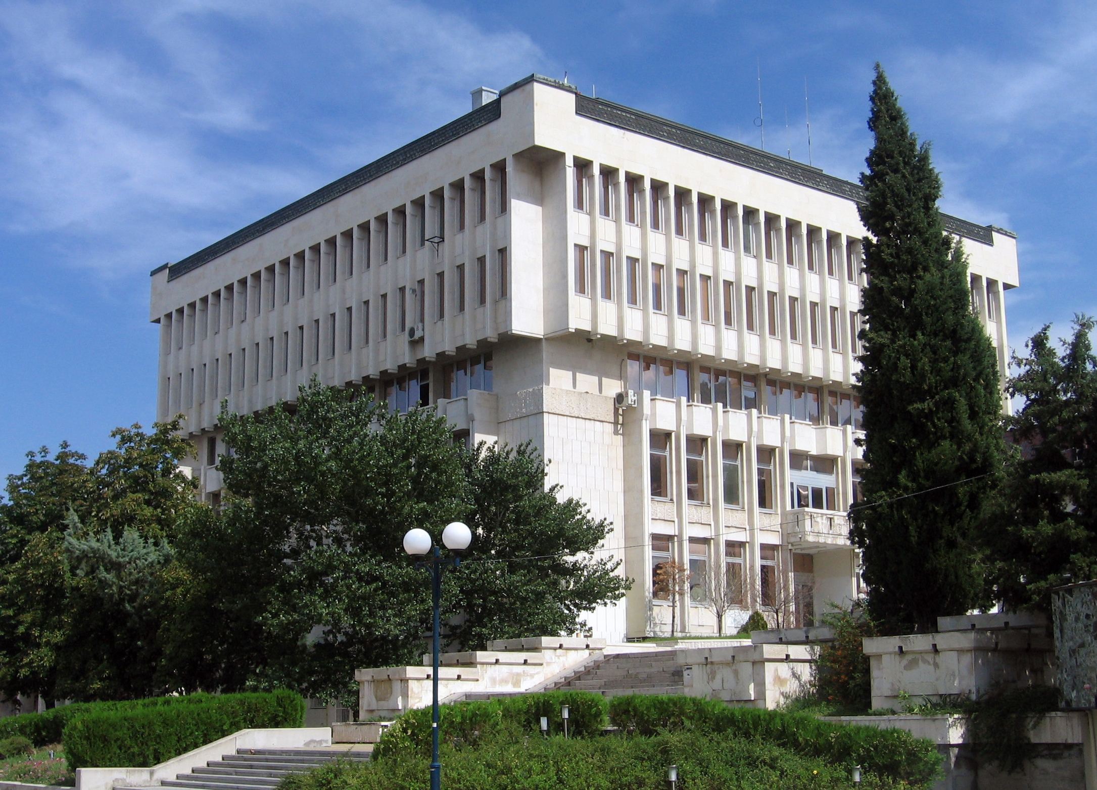 Сграда в центъра на Асеновград